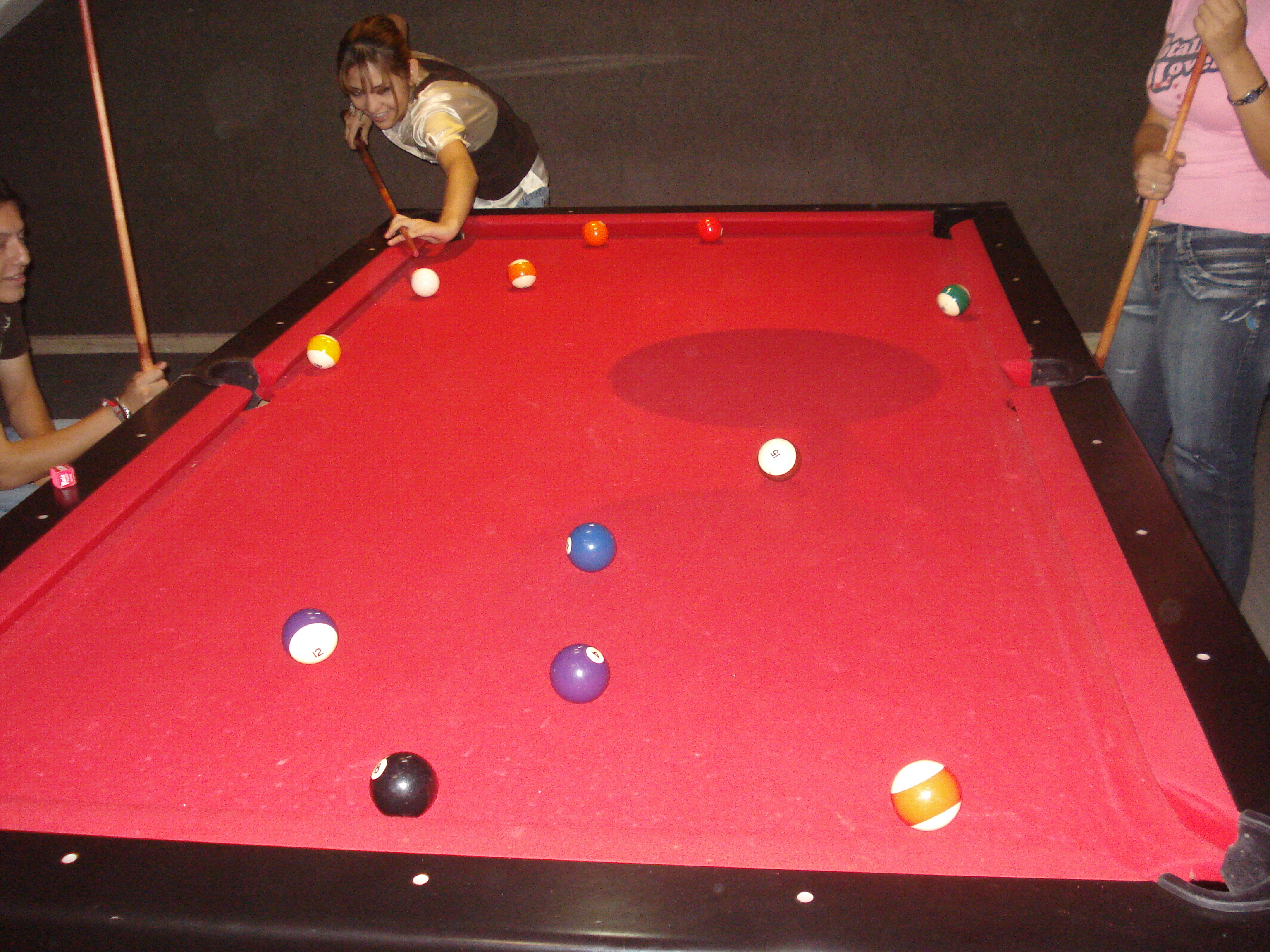 Jugando billar en Monterrey